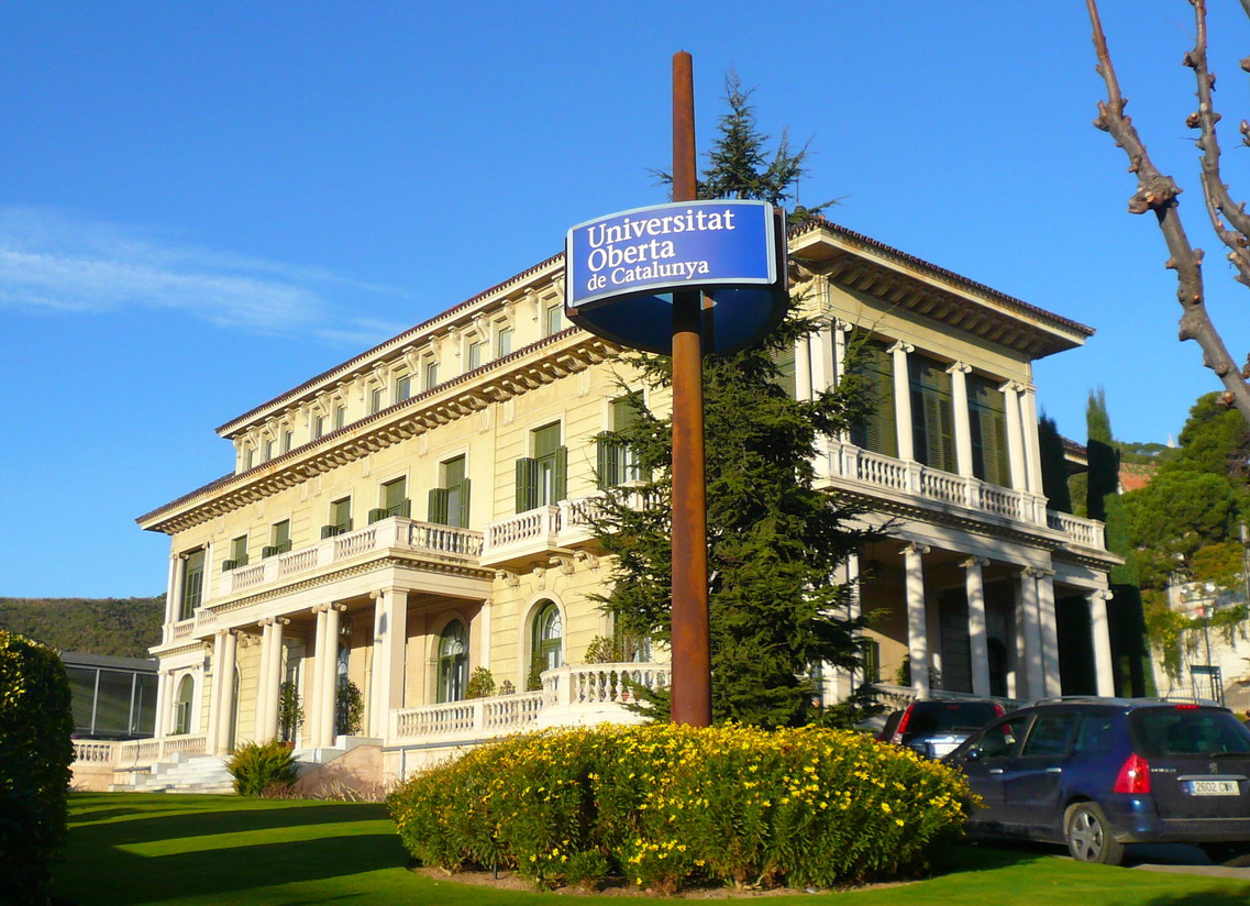 Rectorat de la Universitat Oberta de Catalunya, a l'avinguda del Tibidabo de Barcelona